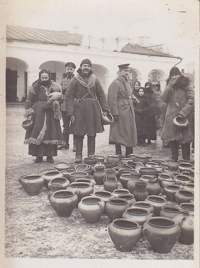 Беларуская (тарашкевіца): Пружаны (Pružany), пляц Рынак (plac Rynak)